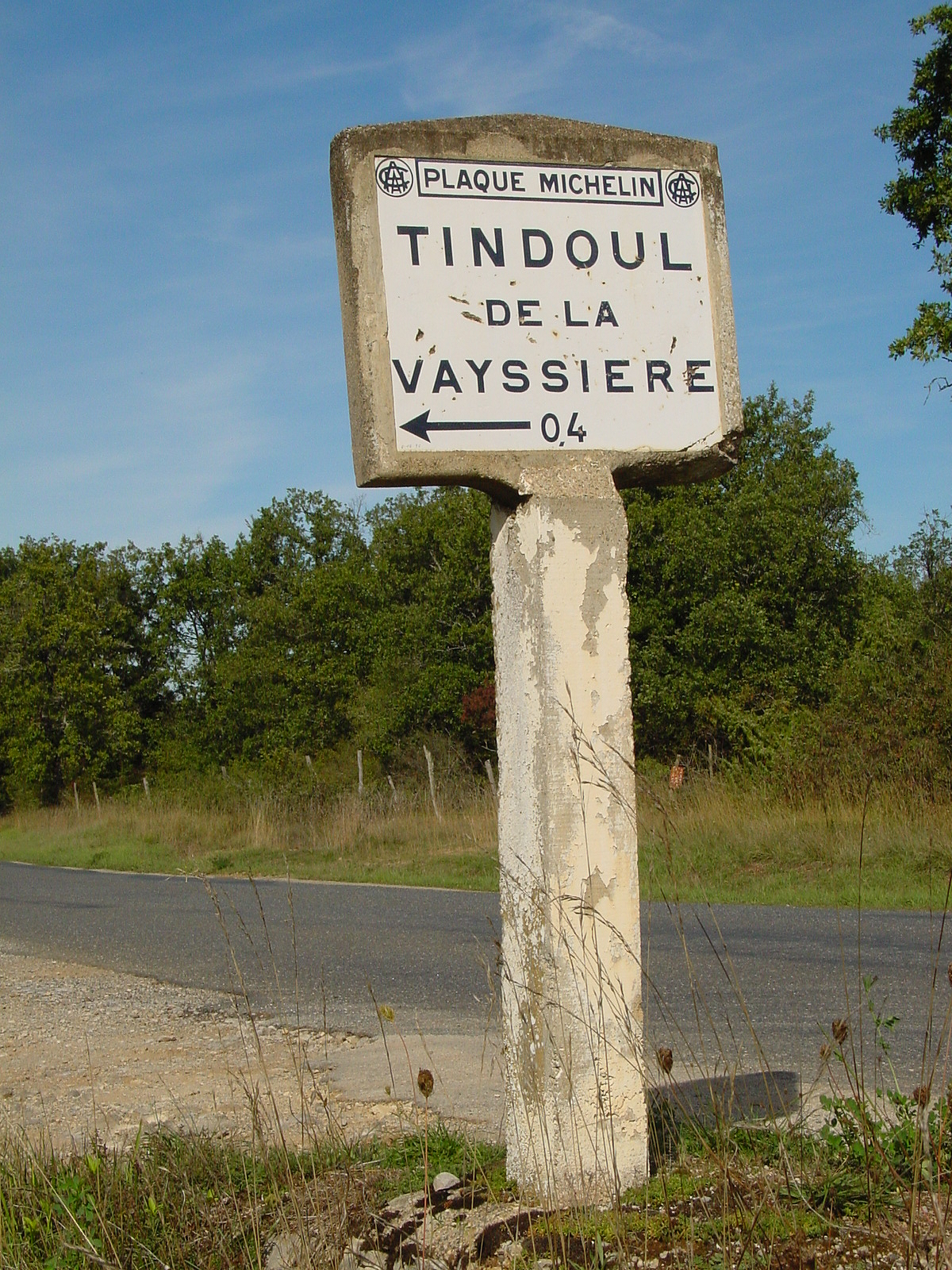 Borne de signalisation Michelin au bord de la D 904 en Aveyron indiquant aux touristes la direction à prendre pour aller voir le tindoul (= trou) de la Vayssière.